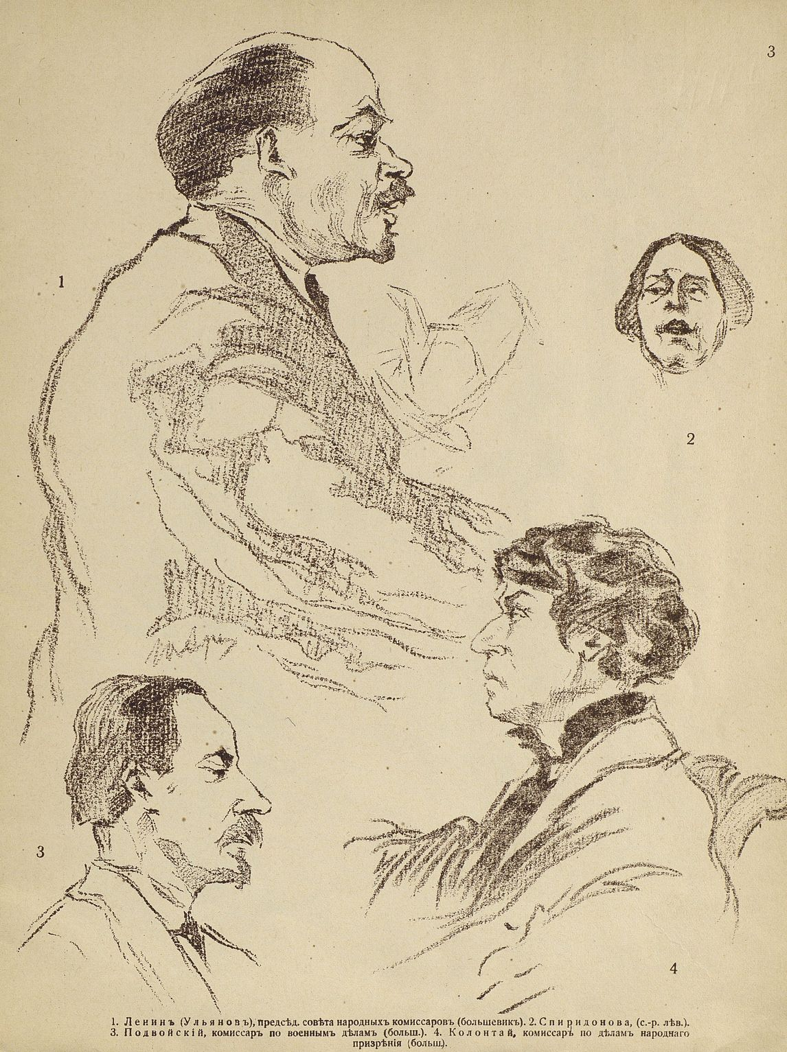 Арцыбушев, Юрий Константинович. "Диктатура пролетариата" в России: Политические деятели на заседаниях советов раб., солдат. и крест. депутатов, учредительного собрания, крестьянских съездов и проч. в декабре 1917 и в январе 1918 гг. : [Альбом] / Ю. К. Арцыбушев. - М. : Изд-во И. Кнебель, 1918. - 31 с. ил., портр. В 1926 году рисунки проданы автором Русскому заграничному историческому архиву (РЗИА) в Праге: сегодня ГА РФ (Р-7030, oп. 1). В настоящее время доступ к этому собранию полностью открыт.